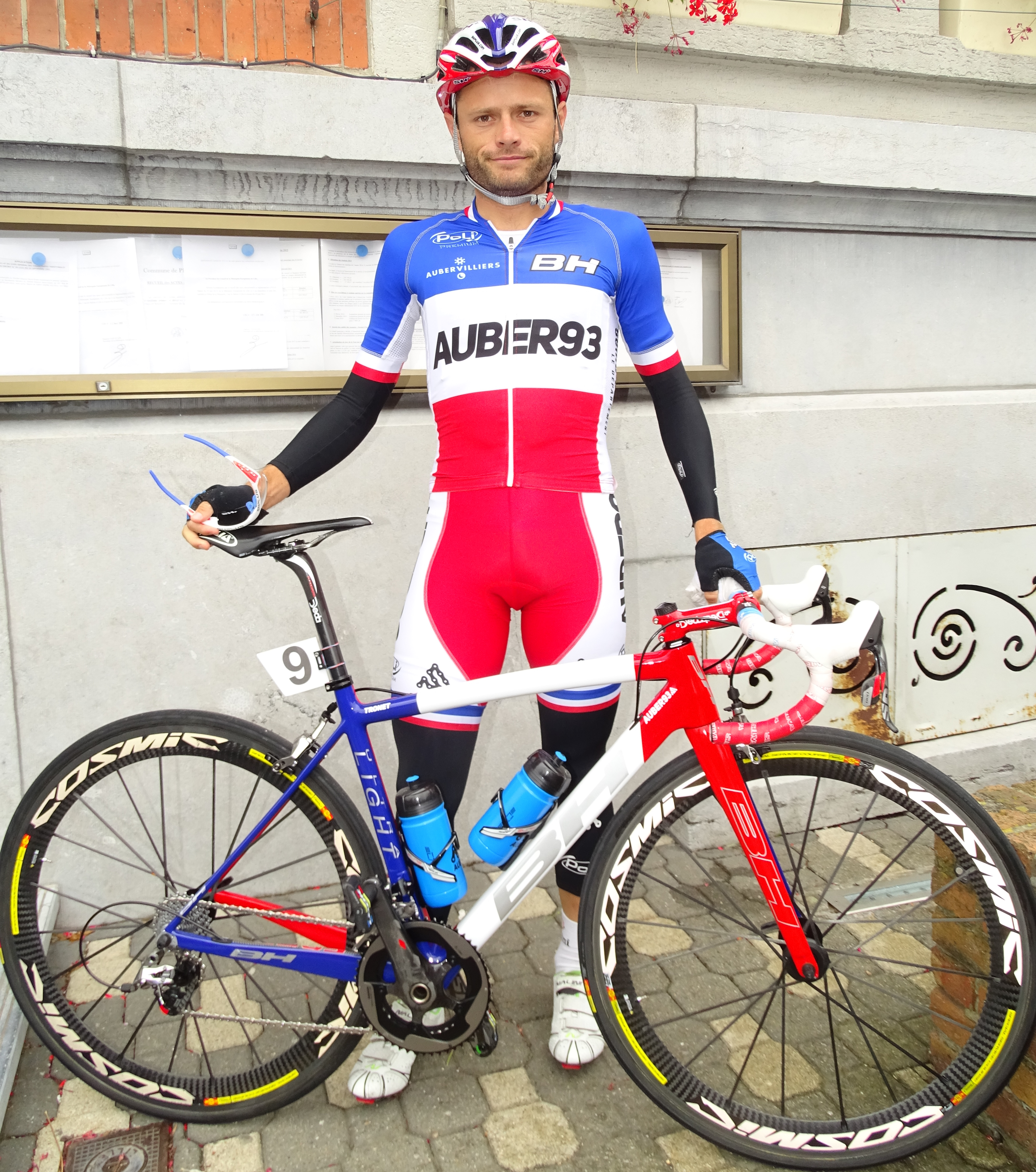 Reportage réalisé le dimanche 26 juillet à l'occasion du départ et de l'arrivée du Grand Prix de la ville de Pérenchies 2015 à Pérenchies, Nord, Nord-Pas-de-Calais, France.